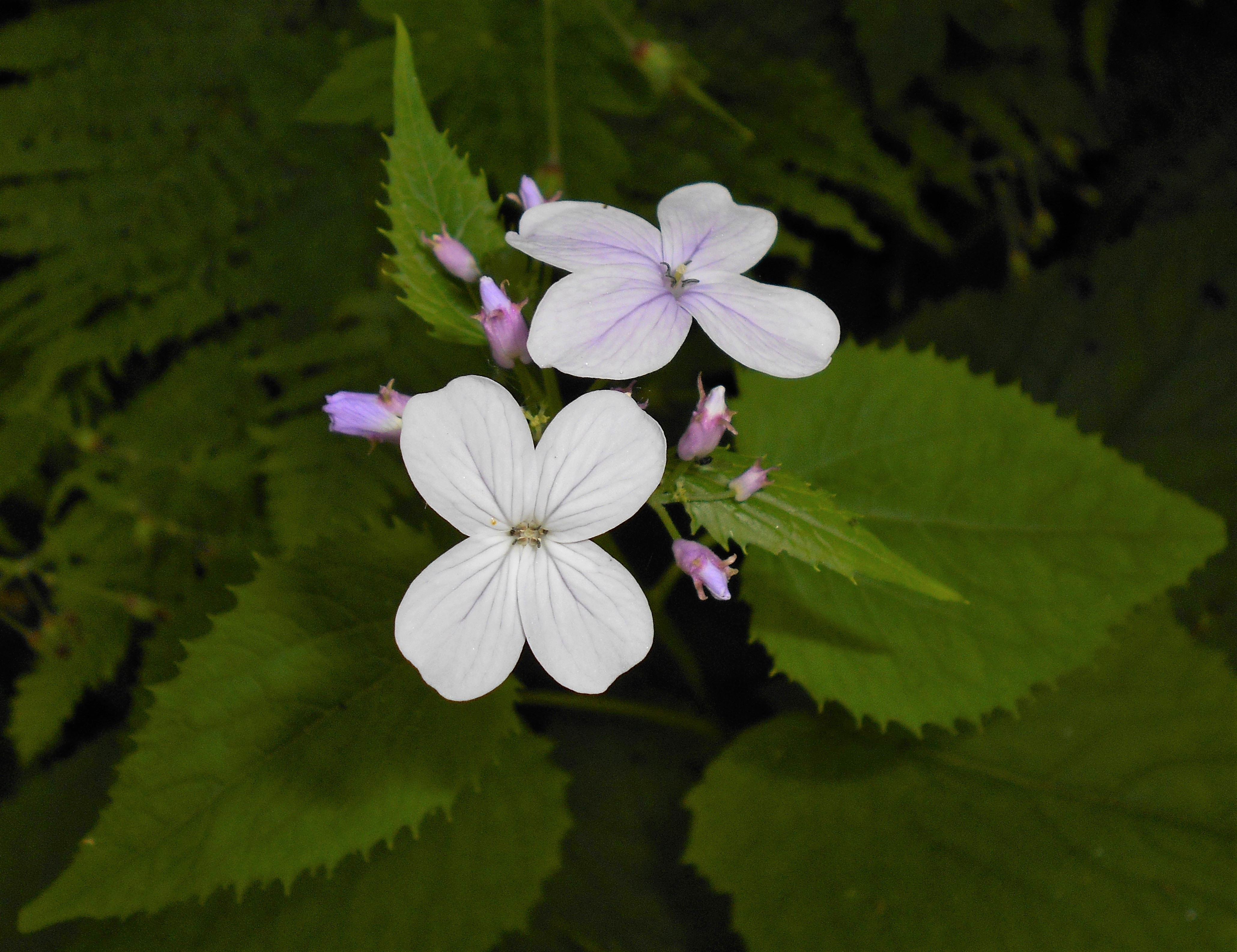 Miesiącznica trwała (Lunaria rediviva), Ogród Botaniczny UMCS, Lublin, Polska.